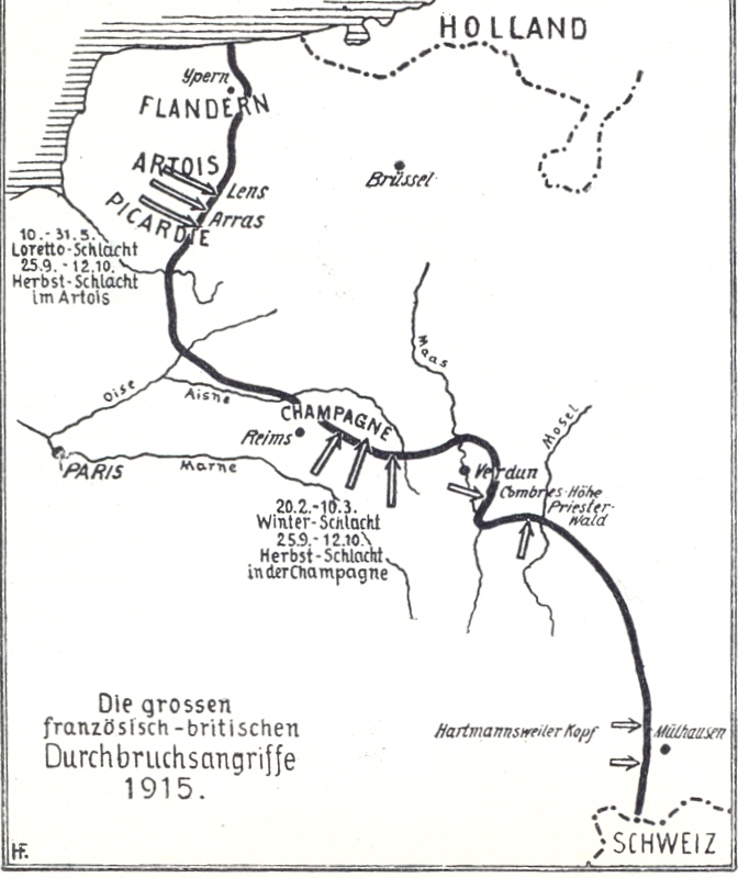 Karte Seite 38: Alliierte Durchbruchsangriffe im Westen 1915